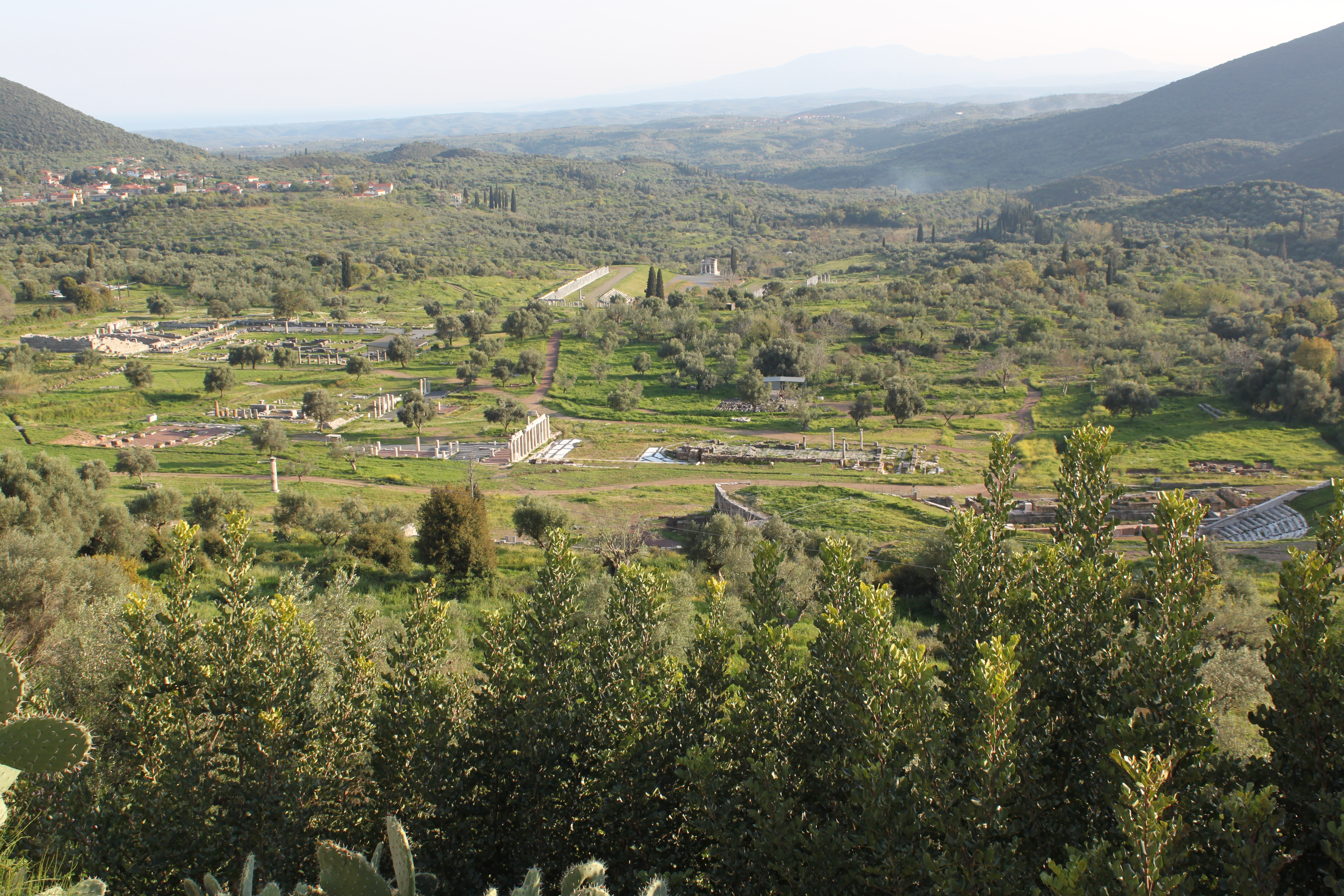 Vue générale de la ville antique de Messène